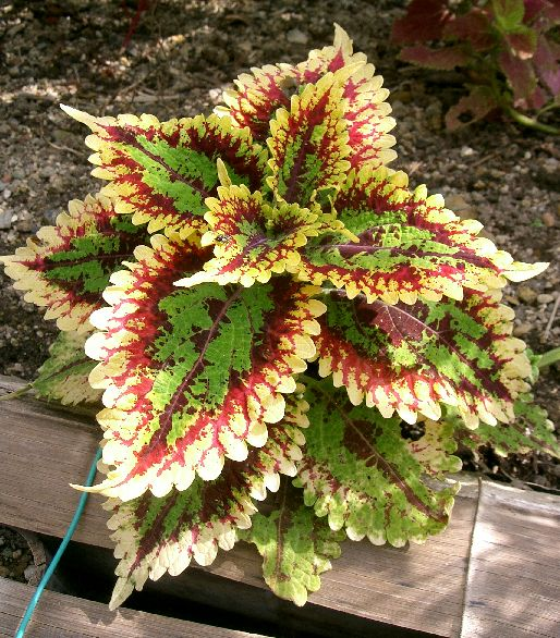 Coleus sp. // Place:Osaka-fu Japan